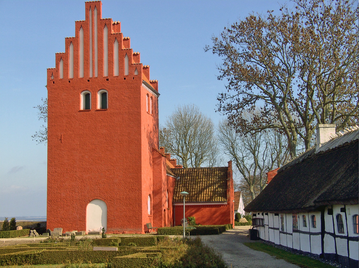 Gershøj kirke, vest side